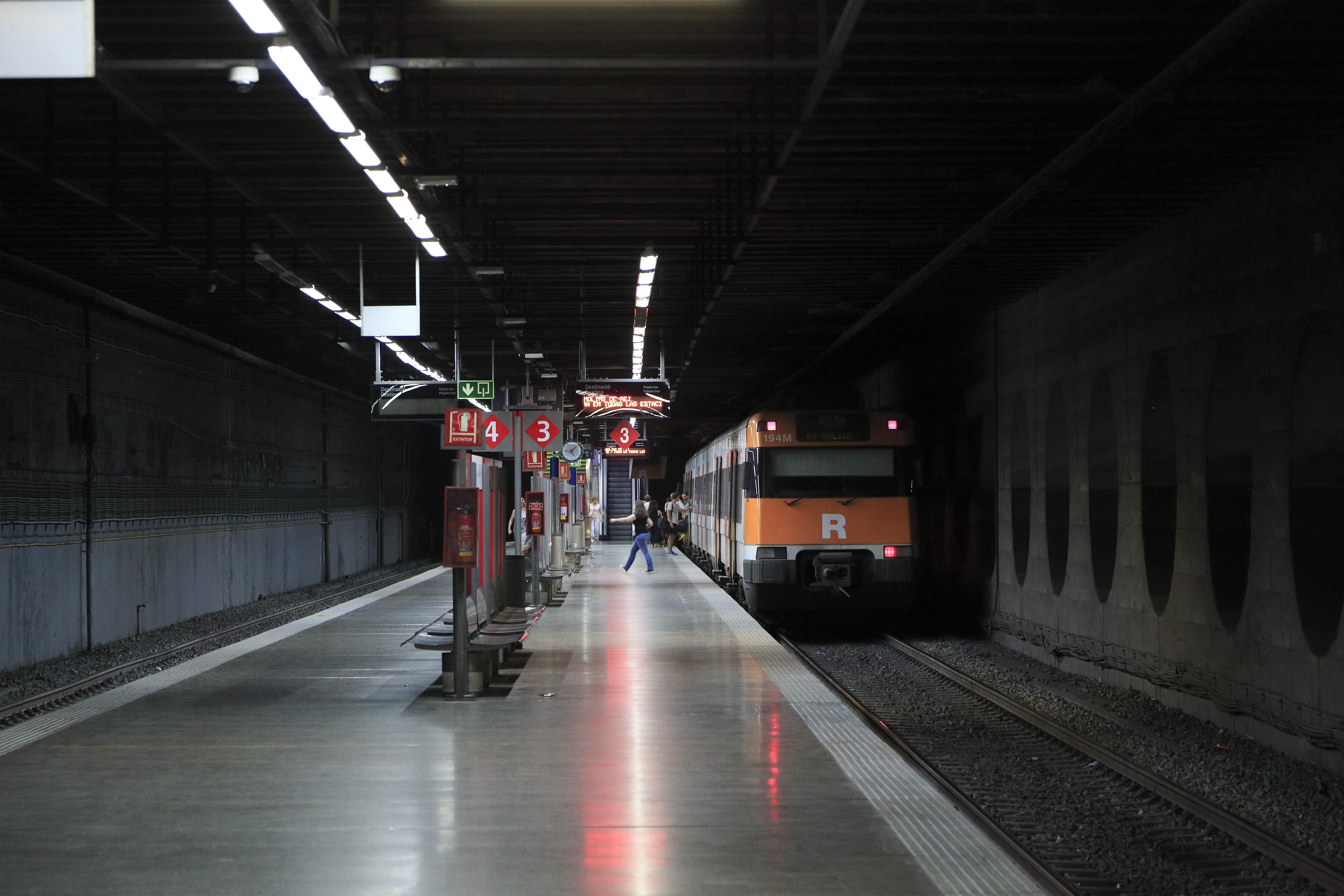 Adif-Bahnsteig Richtung Norden